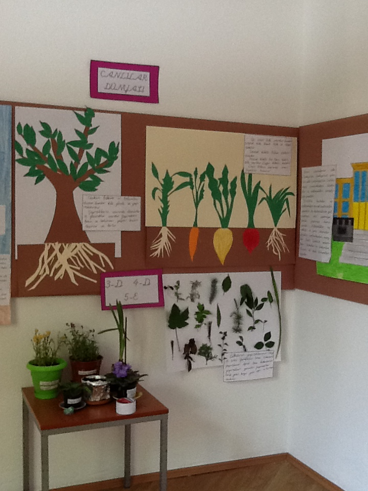 İÇEM Koridor